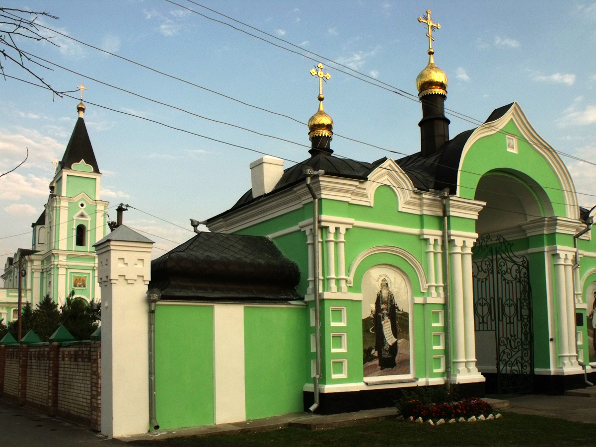 Ворота Троїцького монастиря, Браїлів, Вул. Леніна,1